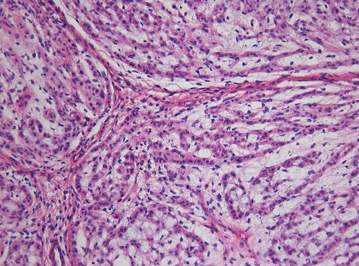 Histopathologie eines Chordoms. Hämatoxylin-Eosin-Färbung. 200x